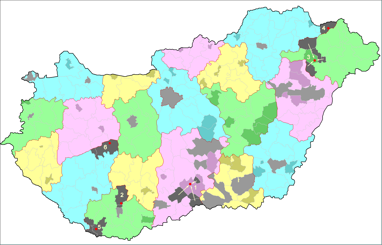 Az 1950-es járásrendezés során alakult hat új járás Magyarországnak a rendezés előtti közigazgatási térképén